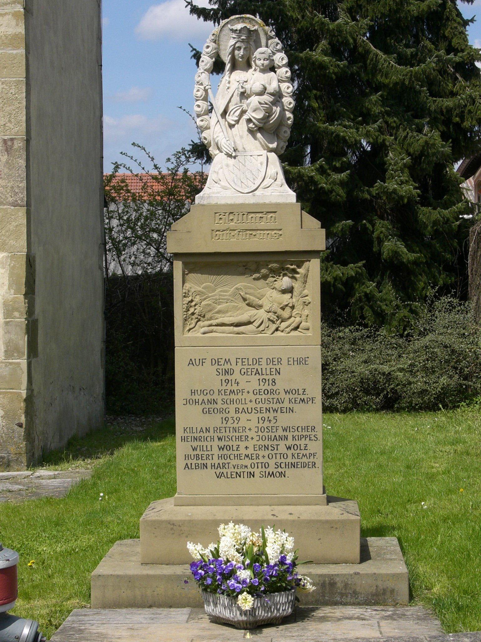 Kriegerdenkmal in Rütschenhausen